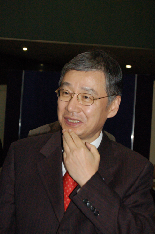 2007년 방송프로듀서대상시상식장에서의 안국정